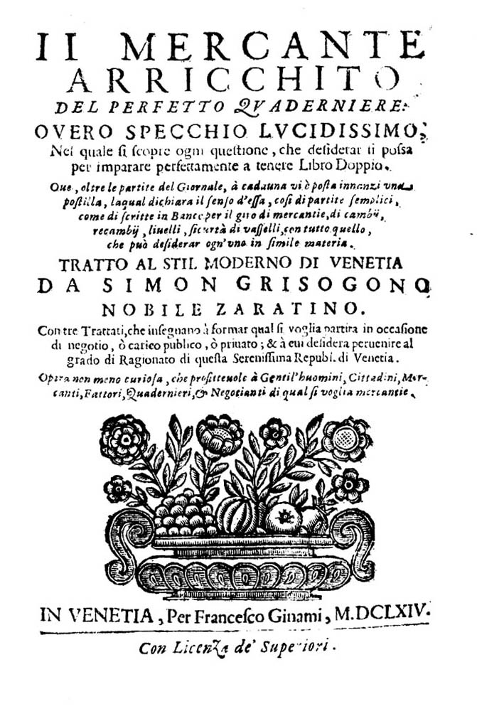 Il mercante arricchito del perfetto quaderniere: ouero Specchio lucidissimo, nel quale si scopre ogni questione, che desiderar si possa per imparare perfettamente a tenere libro doppio ... Tratto al stil moderno di Venetia da Simon Grisogono nobile zaratino. Con tre trattati, che insegnano a formar qual si voglia partita in occasione di negotio, o carico publico, o priuato; & a cui desidera peruenire al grado di Ragionato di questa serenissima Republ. Di Venetia ... . - In Venetia : per Francesco Ginami, 1664. - [132] c. ; 8º .